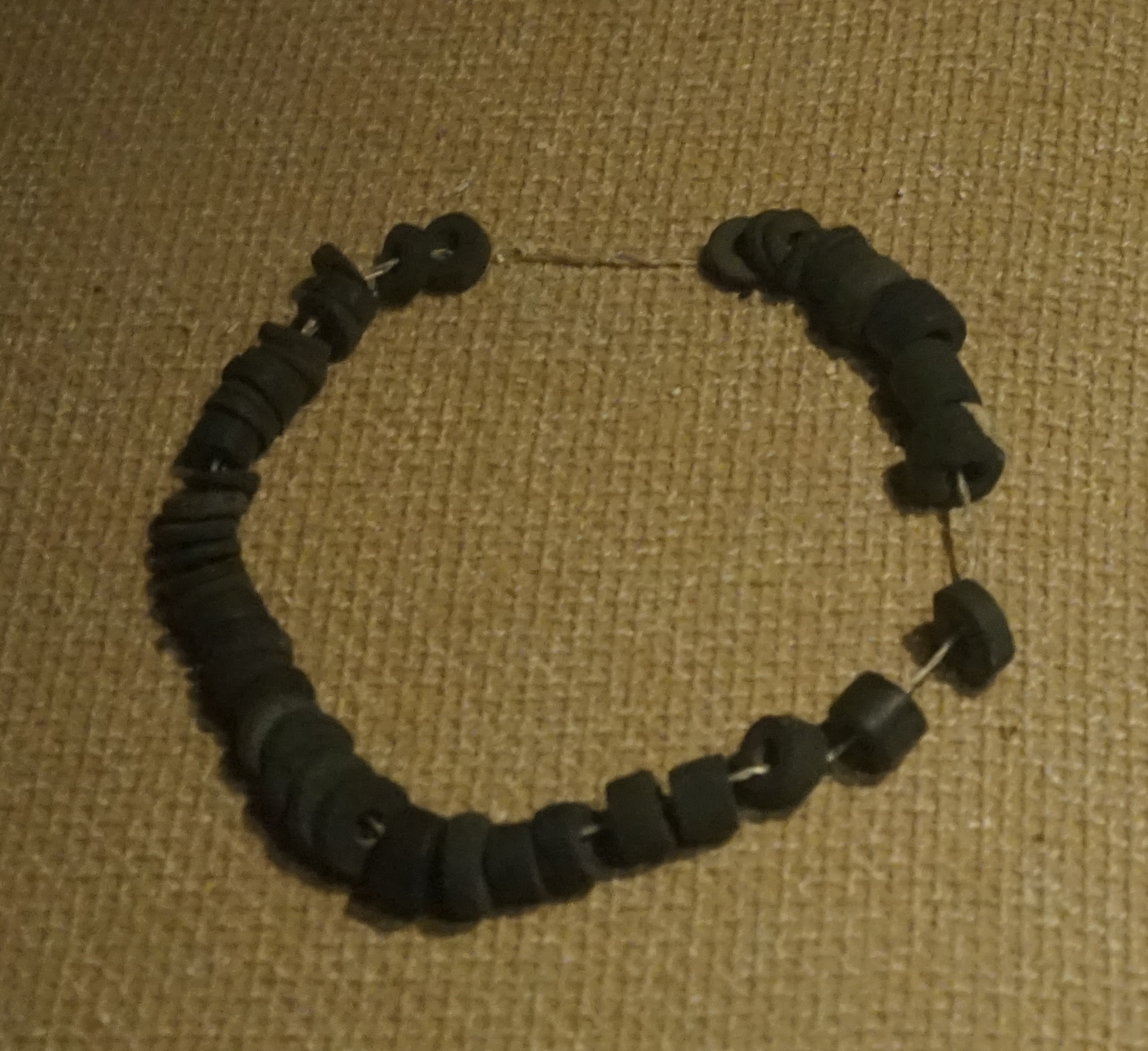 中文（中国大陆）: 石串饰，新石器时代，距今约4000年。庆安县莲花池二号遗址。绥化市博物馆